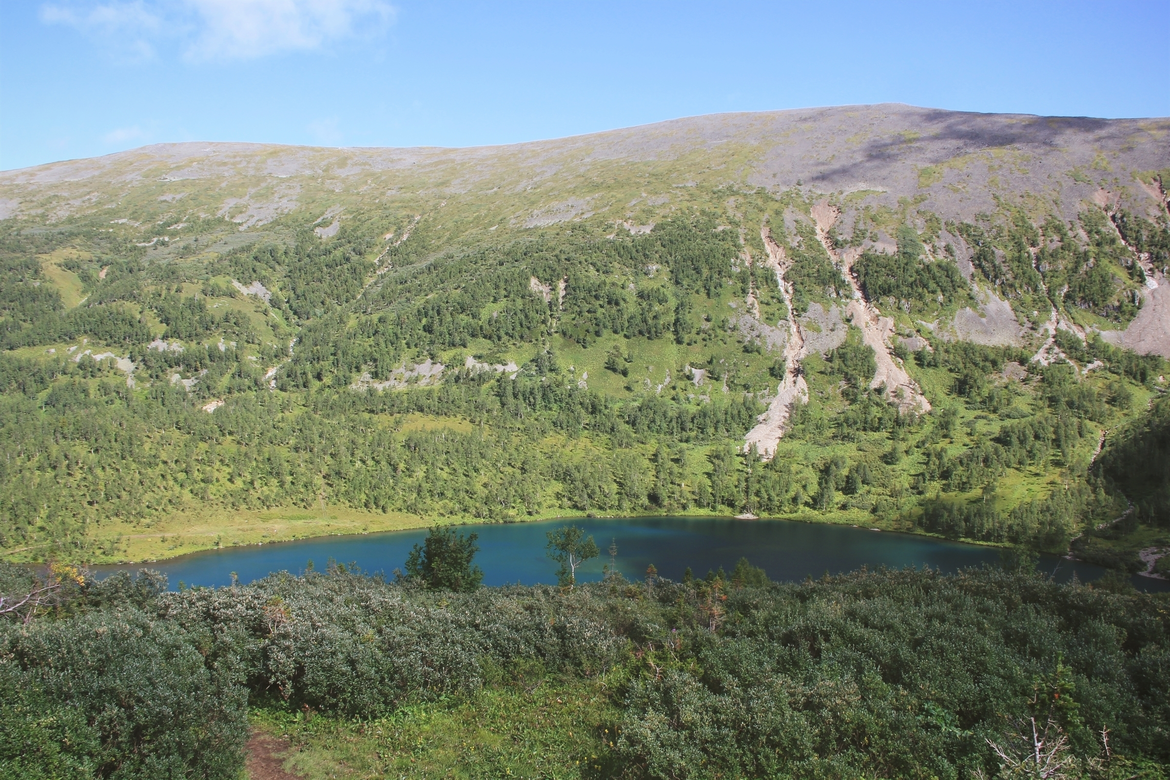 Ивановское озеро, Орджоникидзевский район This image is related to the protected area of Russia number 1910054